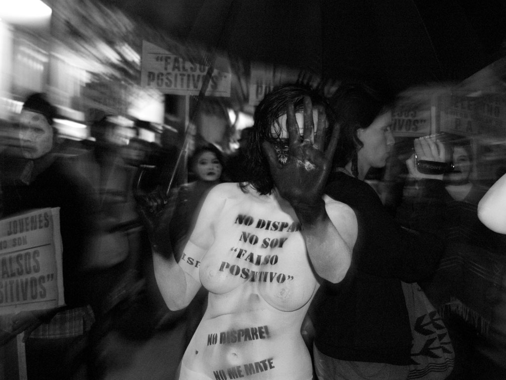 Sin memoria me moría: Acción performática: Corporación Colombiana de teatro. NO DISPARE, NO SOY FALSO POSITIVO Irrupción en el septimazo, junto a las madres de los jóvenes de Soacha asesinados y presentados como muertos en combate por el ejército de Colombia.